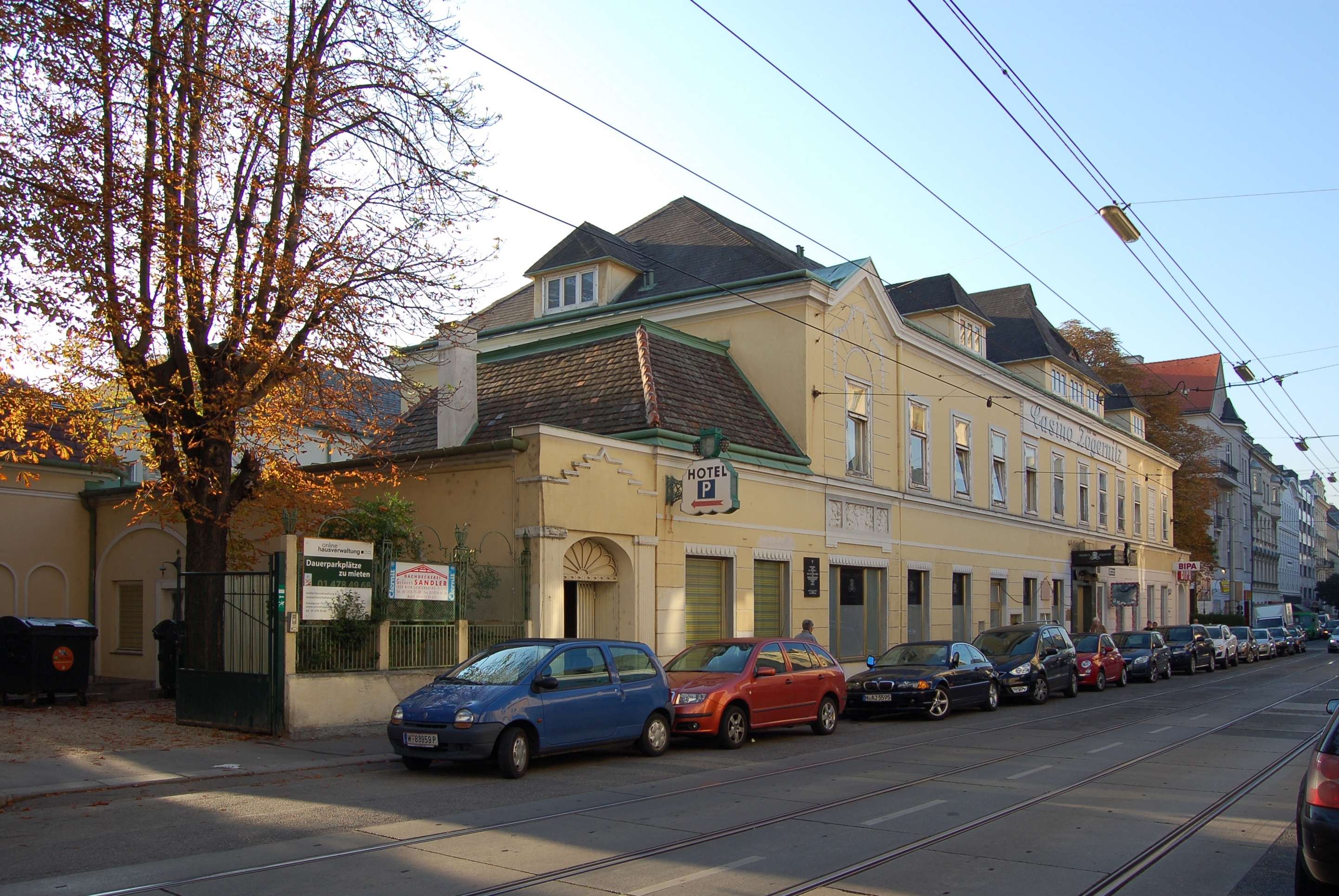 Das Casino Zögernitz in der Döblinger Hauptstraße 76-78 in Wien-Döbling.